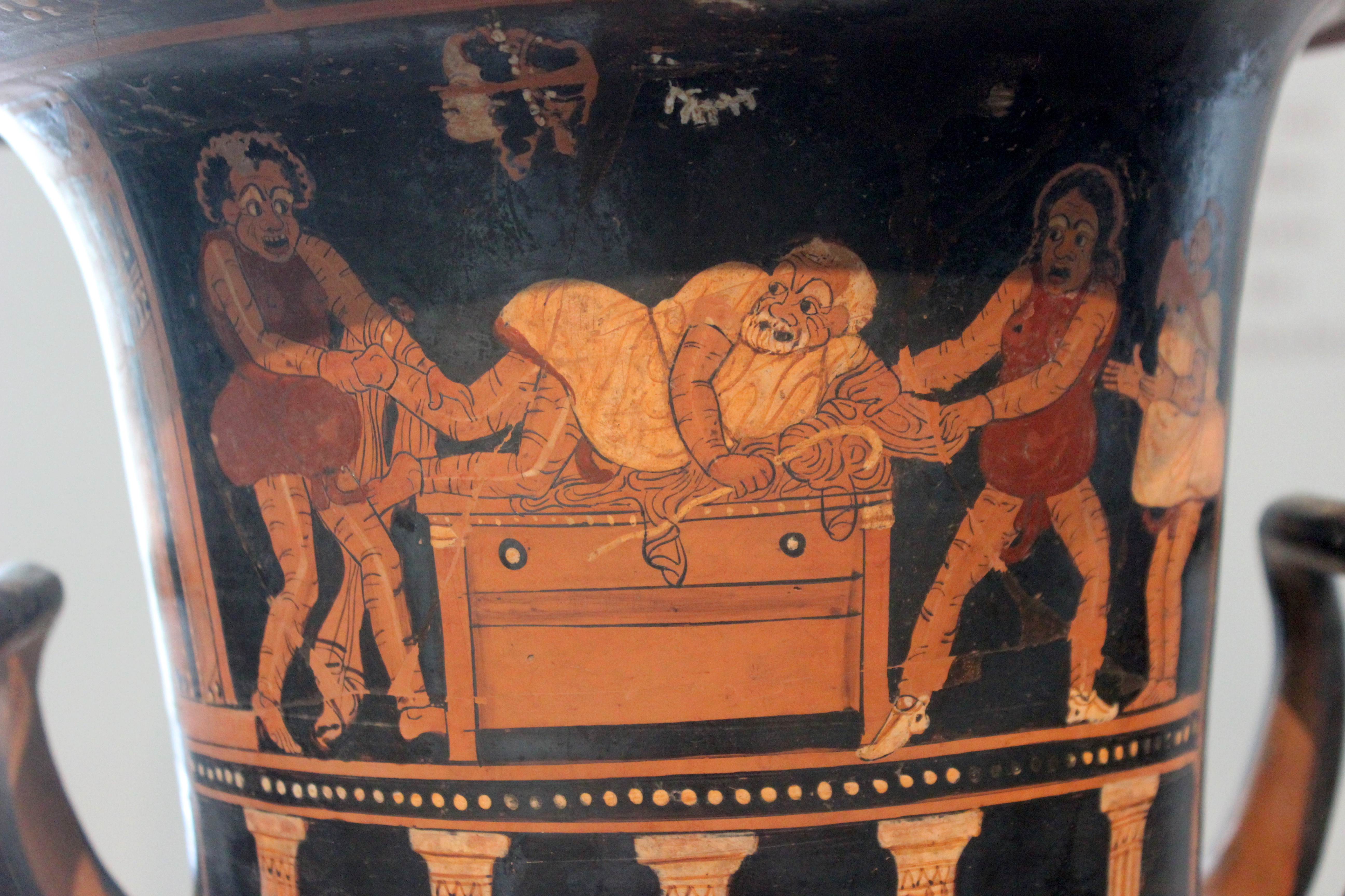 Berlín, Altes Museum. Crátera de Asteas con representación de un avaro.